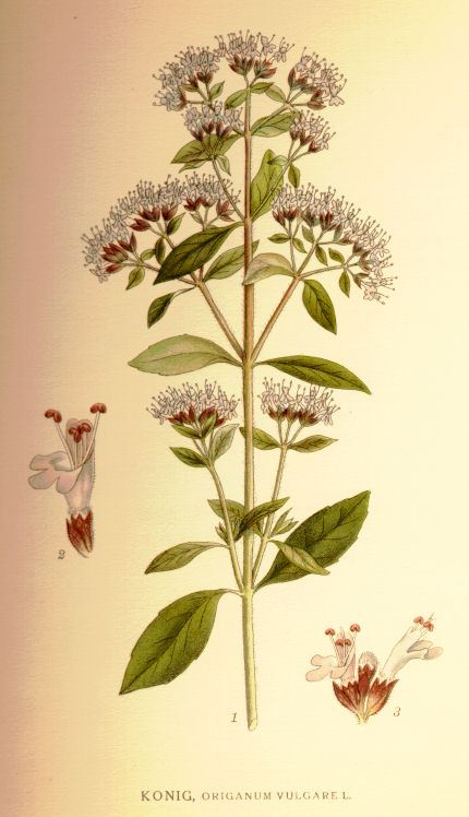 Origanum vulgare